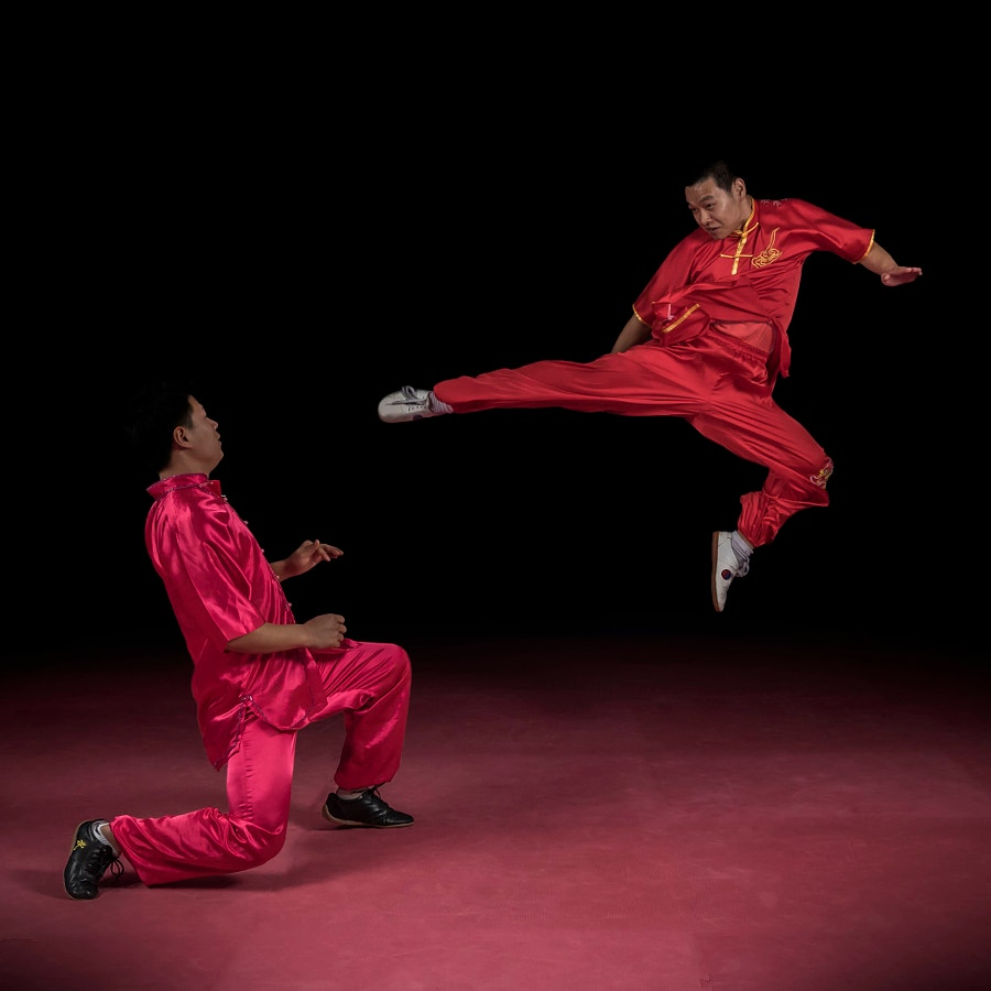 Мастера Школы кунг-фу в ОАЭ (Хан и Тони Сюэ)